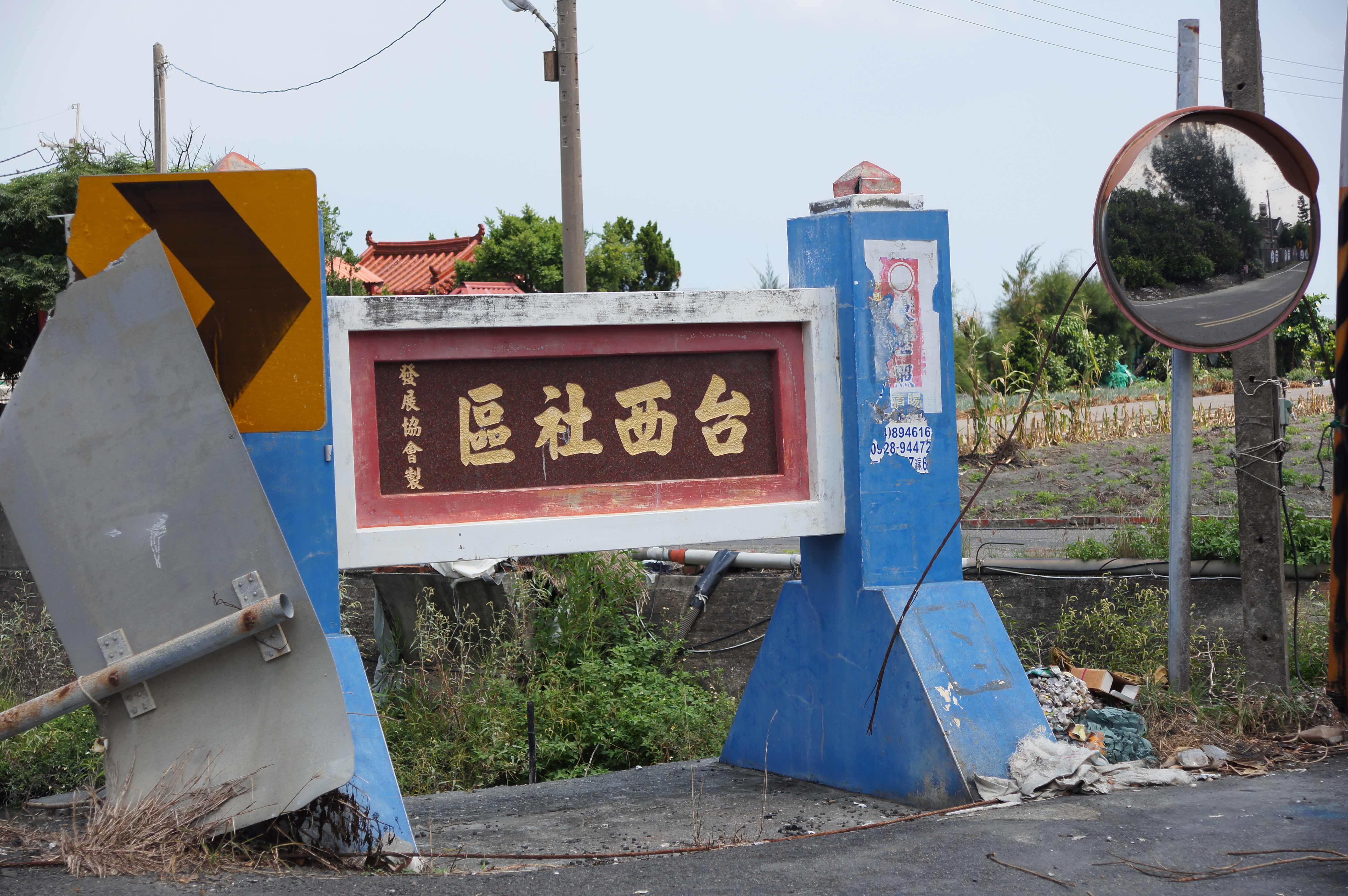 台西村的台西社區標誌